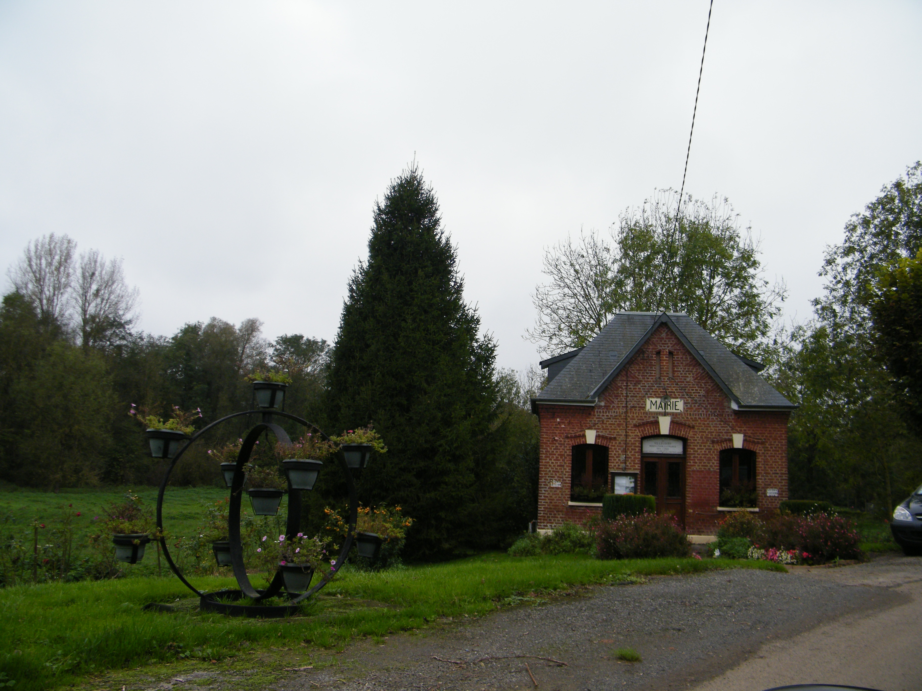 Bâtiments communaux.